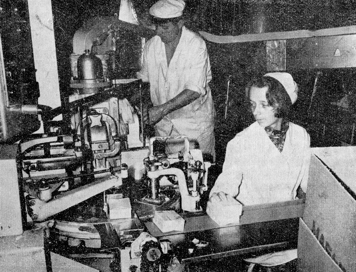 Koło, 1978r. Spółdzielnia mleczarska.